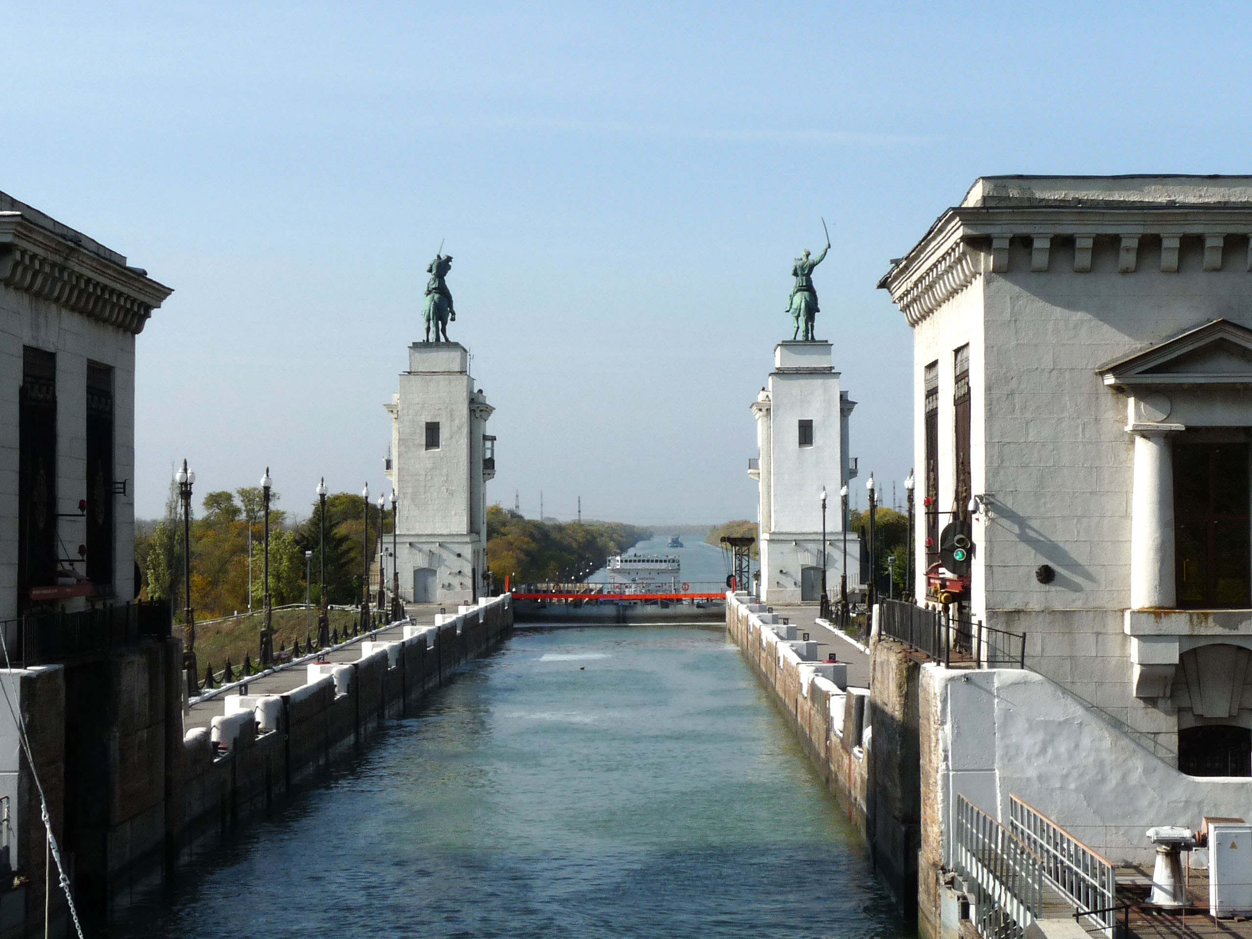 Volga-Don Canal 01